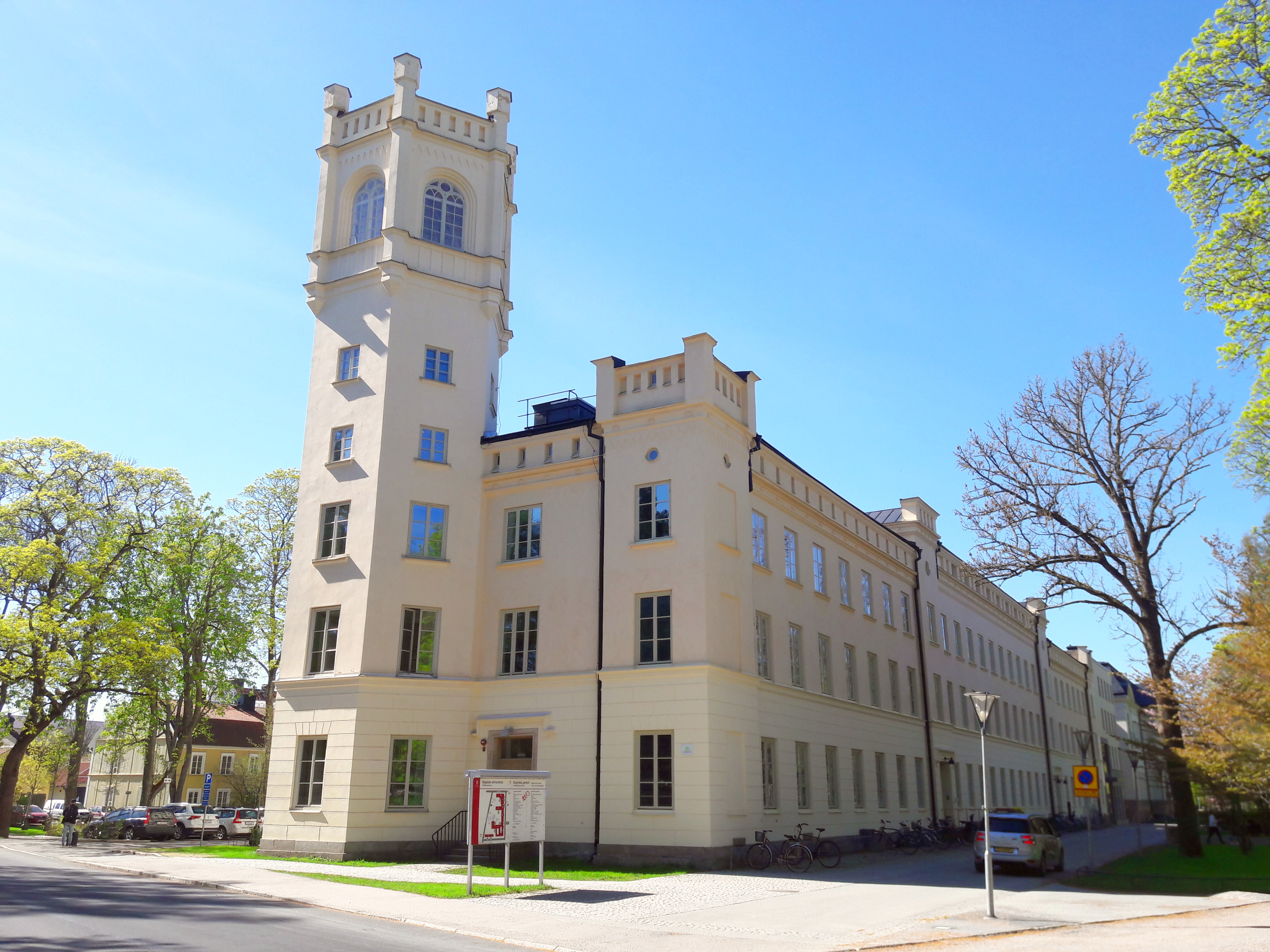 Gamla Kemicum, vid Engelska Parken - Humanistiskt centrum.